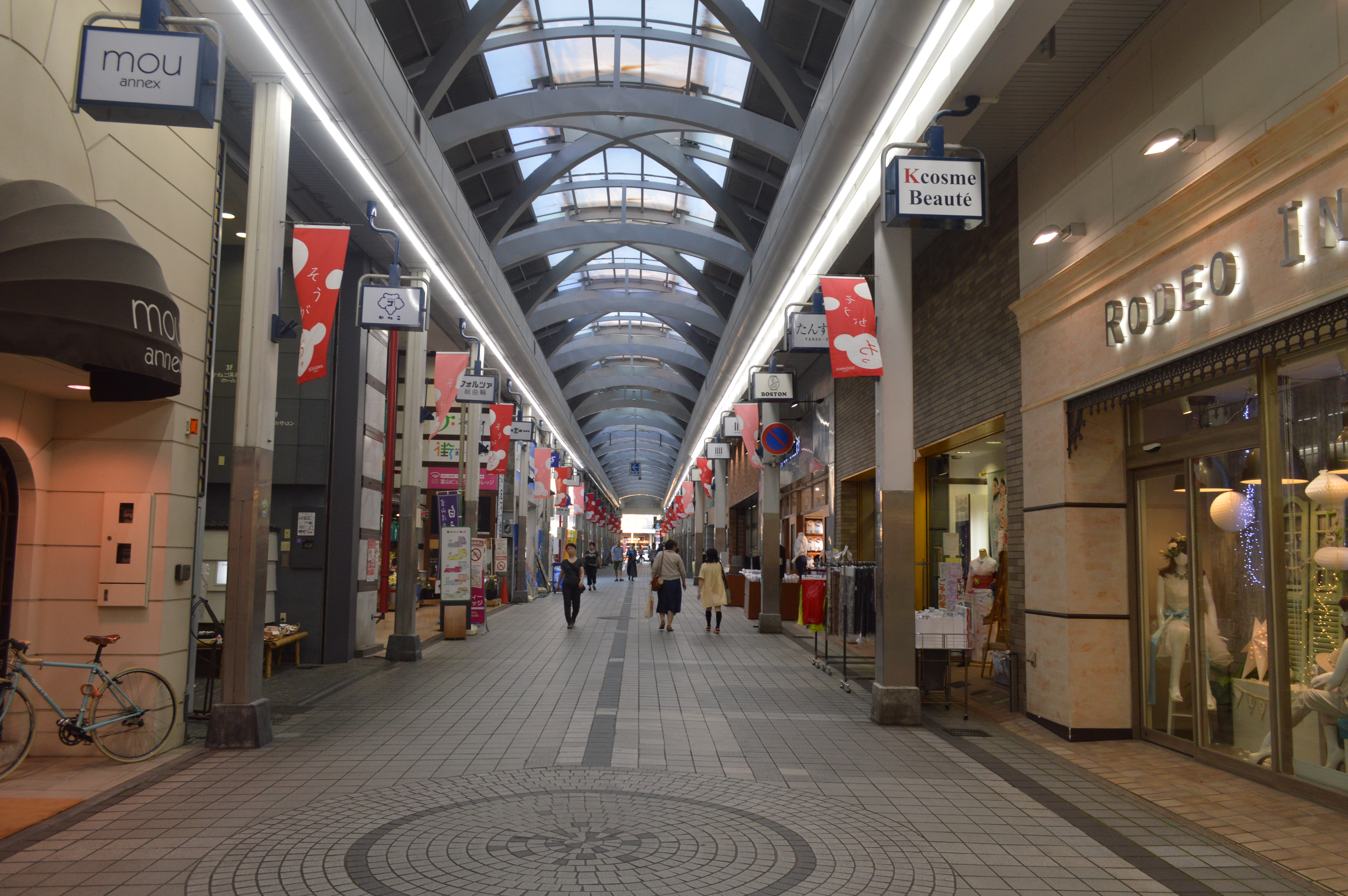 富山市の総曲輪通り商店街。